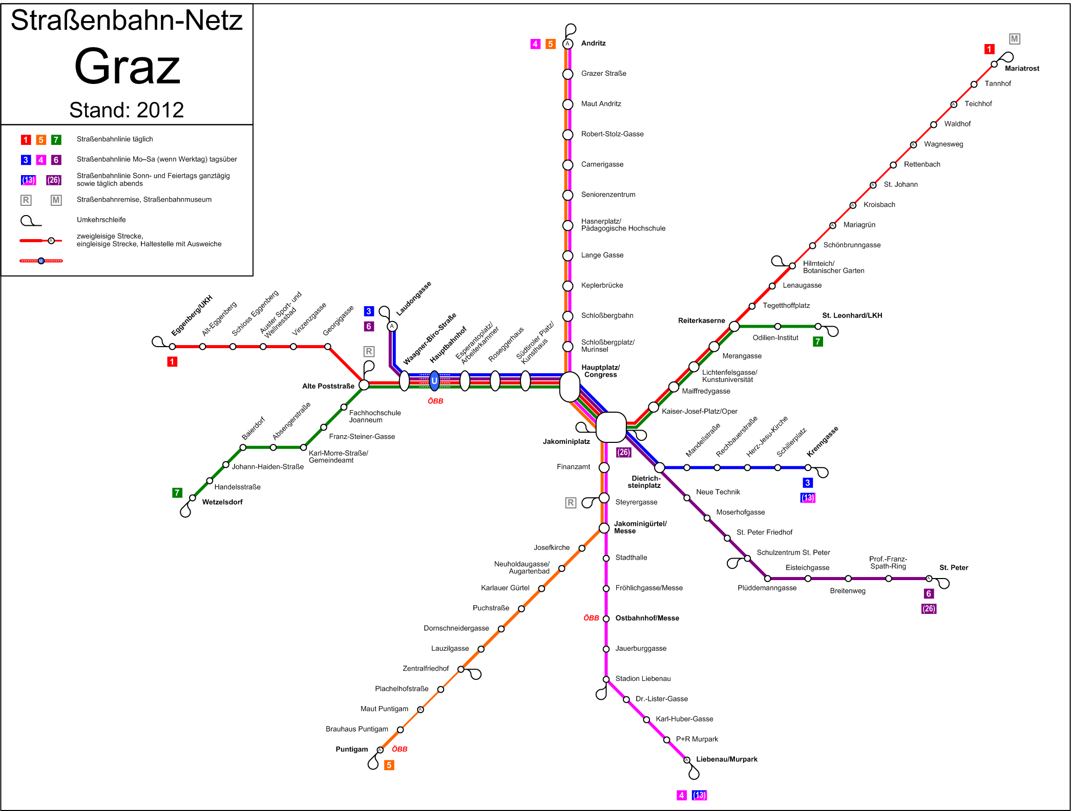 Netzplan der Grazer Straßenbahn